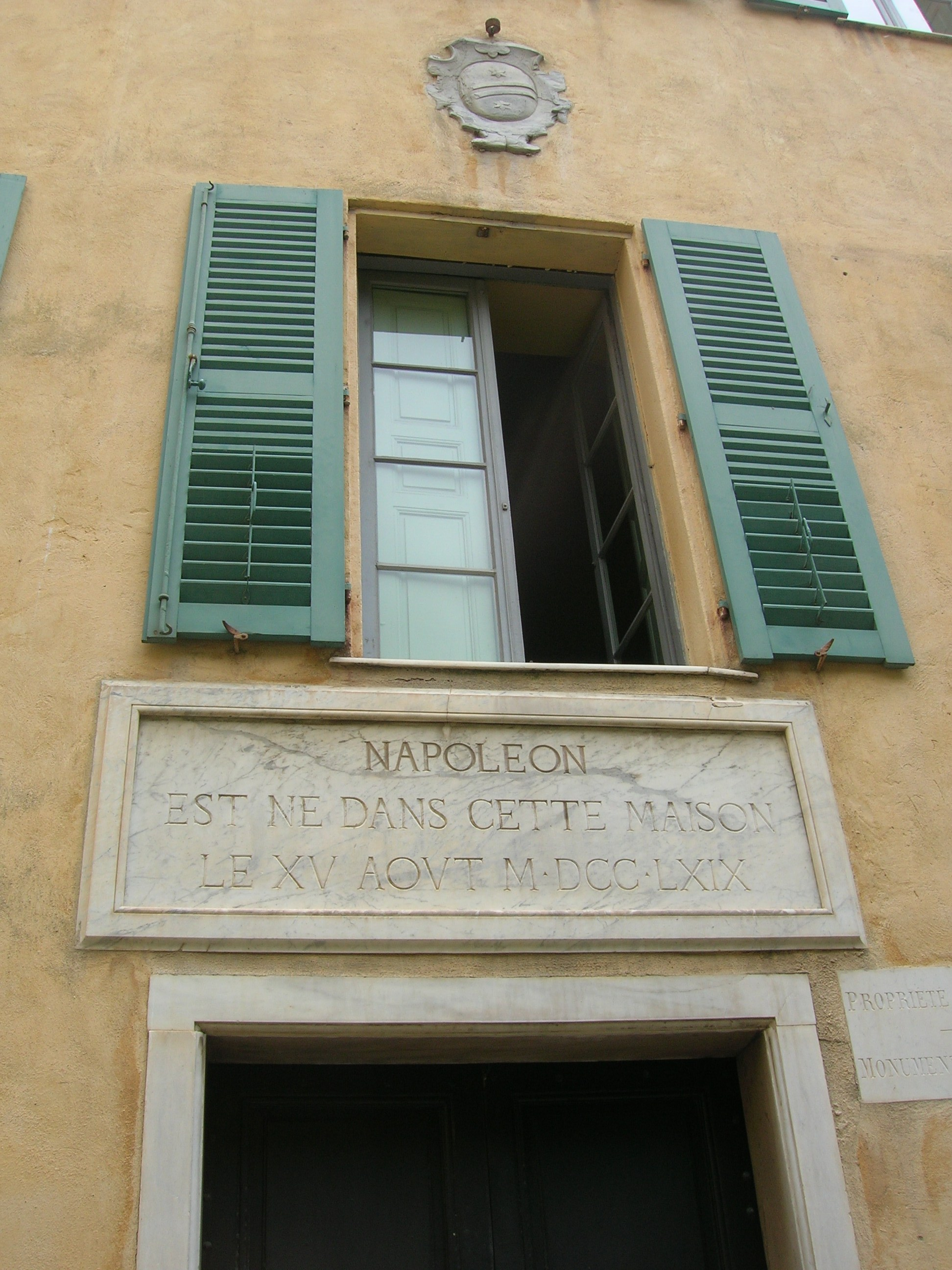 Gebuertshaus vum Napoleon Bonaparte.